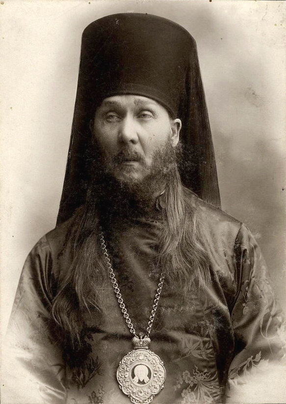 Епископ Мефодий (Герасимов)